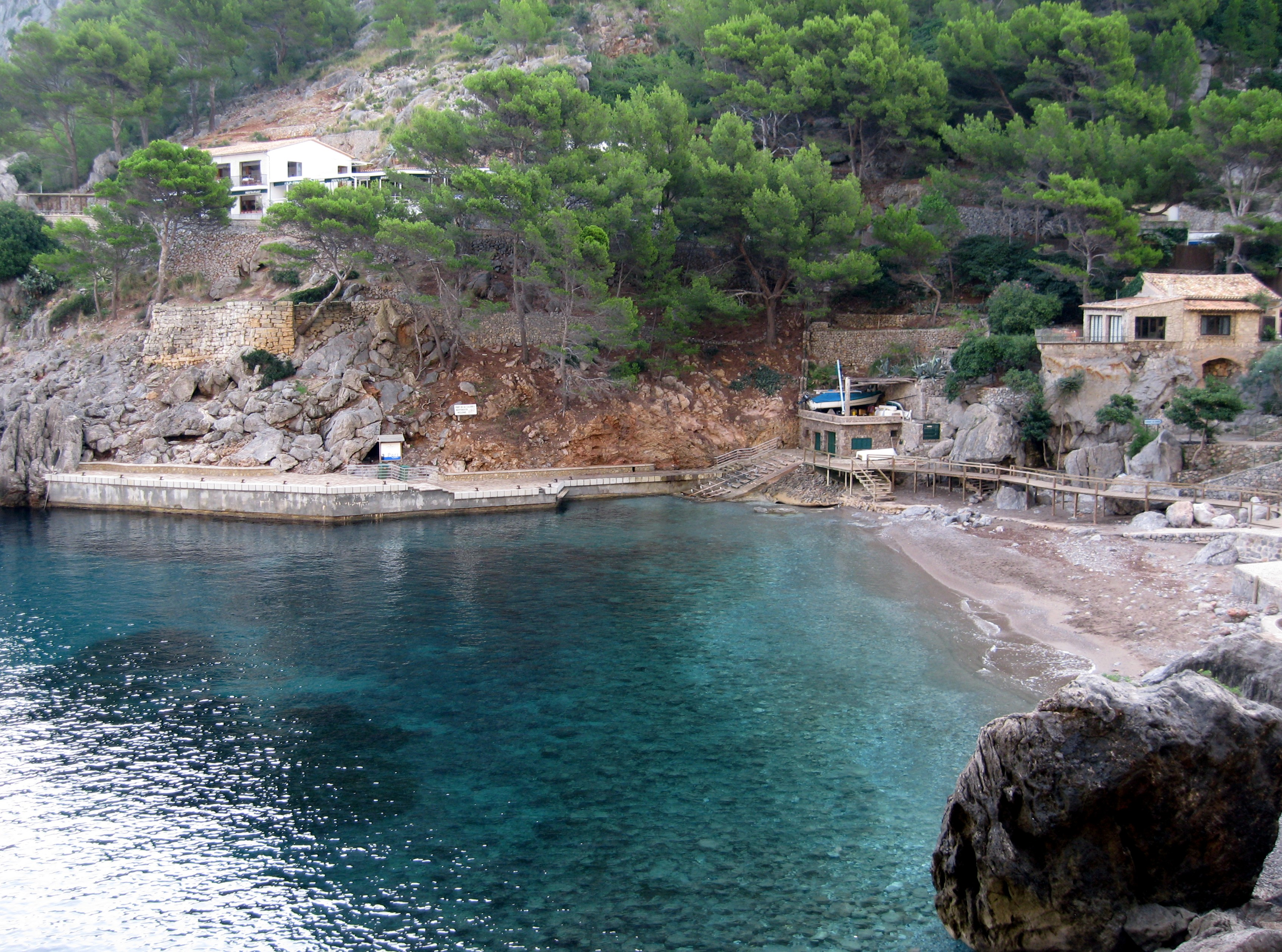 Cala de sa Calobra, Escorca, Mallorca, Spain